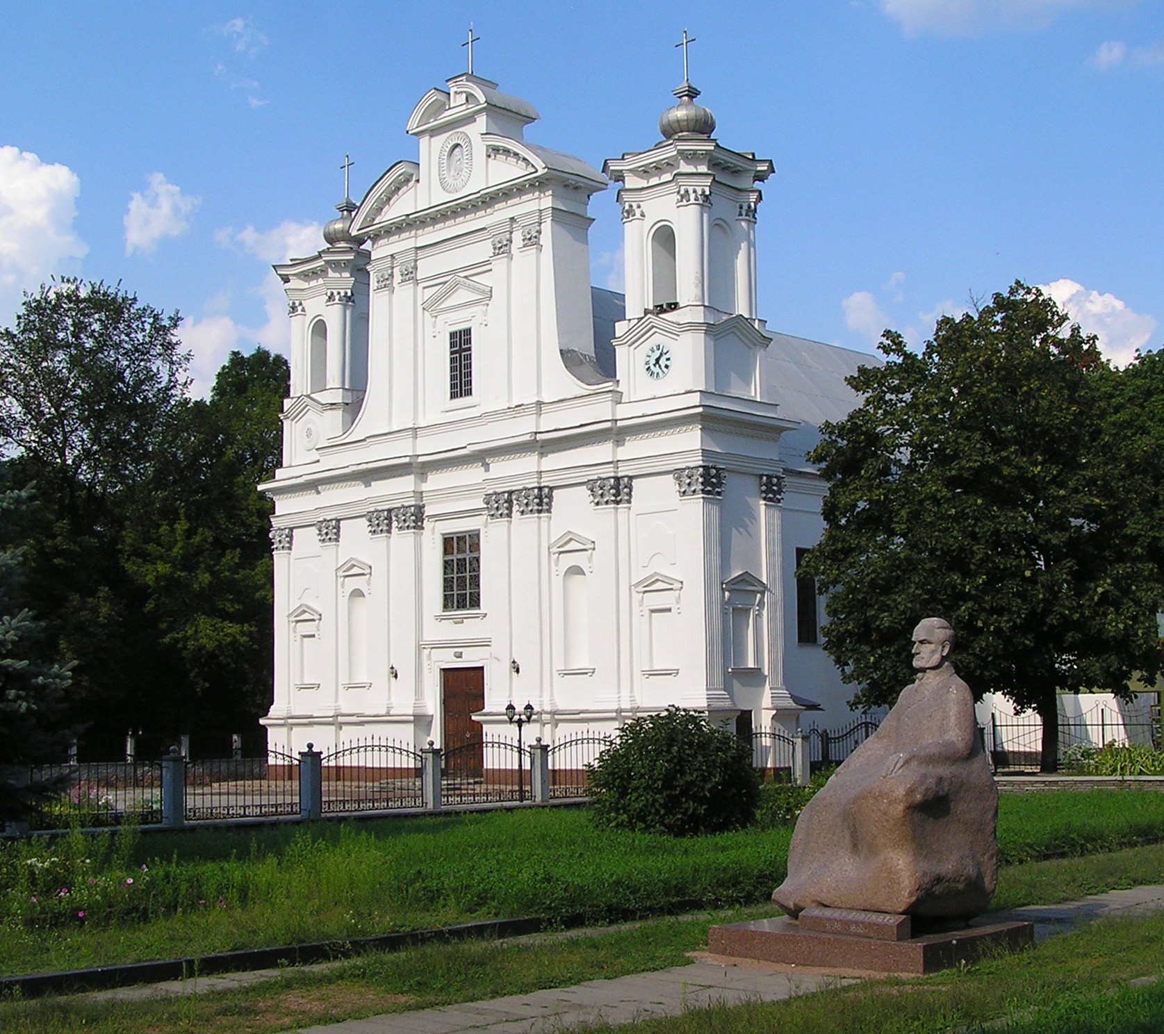 Костьол кінця 17ст. по вул. Дарбіняна,7 у м.Користишів Житомирської обл.